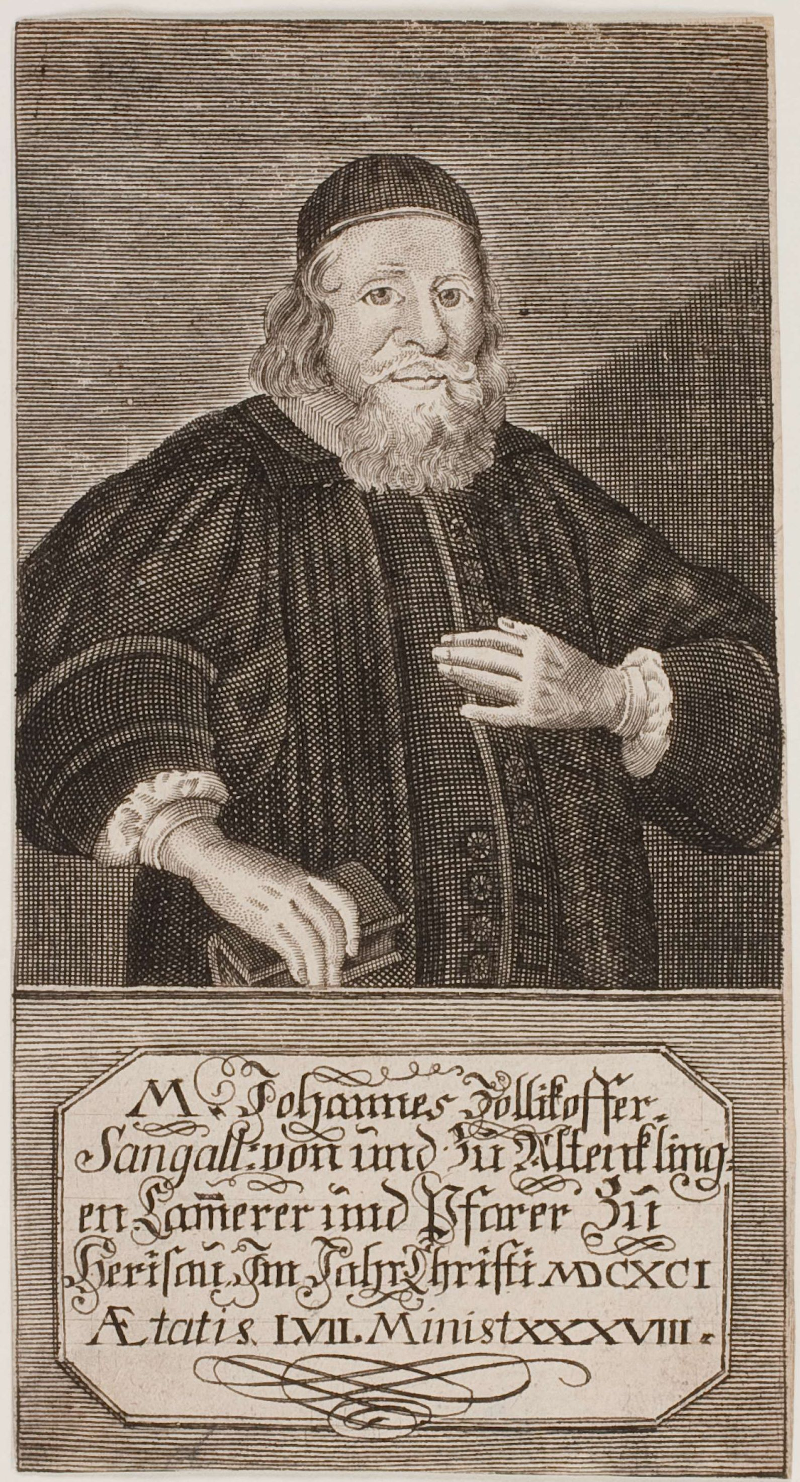 Kupferstich 135 x 71 mm (Bild, Blatt) Wolfenbüttel, Herzog August Bibliothek, Inventar-Nr. A 24896 Literatur: Mortzfeld A 24896